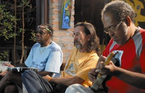 Banda brasileira Trio Mocotó em imagem do acervo da TV Brasil.